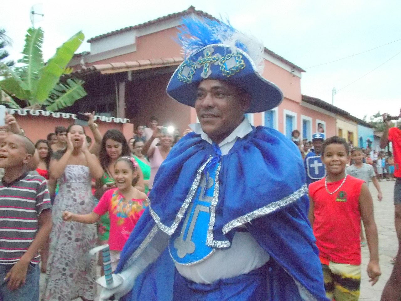 bbbbb